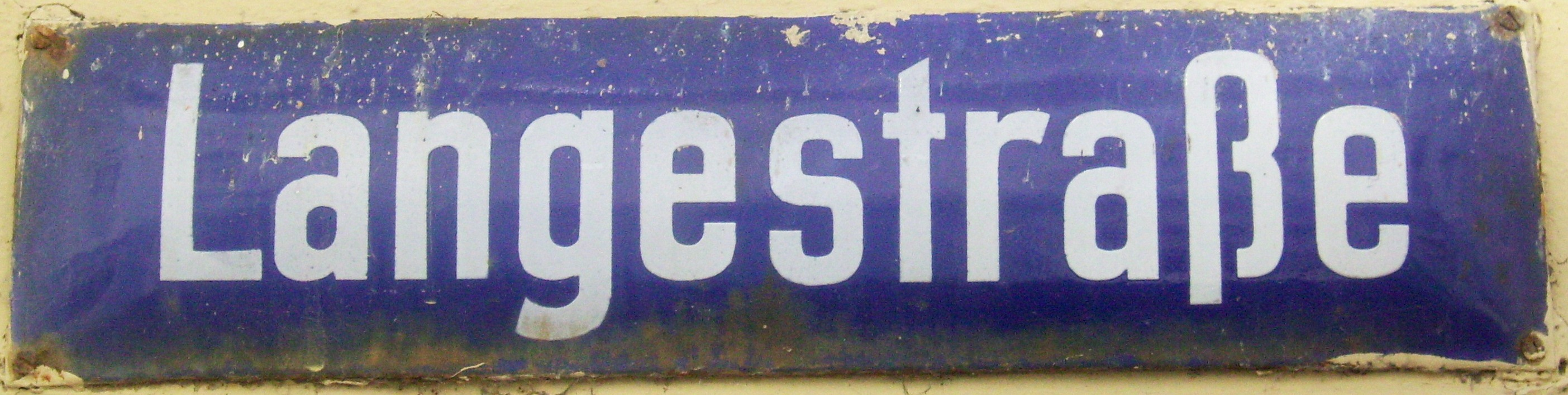 Niemiecka tabliczka z literą ß